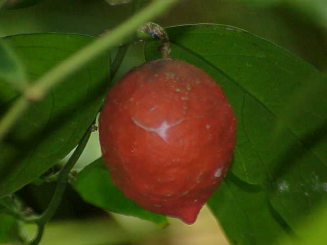 Species: Salacia aurantiaca (syn. Salacia lehmbachii var. aurantiaca) Family: Celastraceae Image No. 1